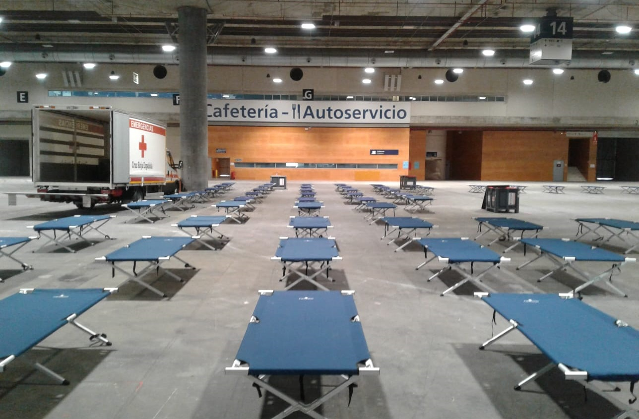 versión de la imagen subida por un bot